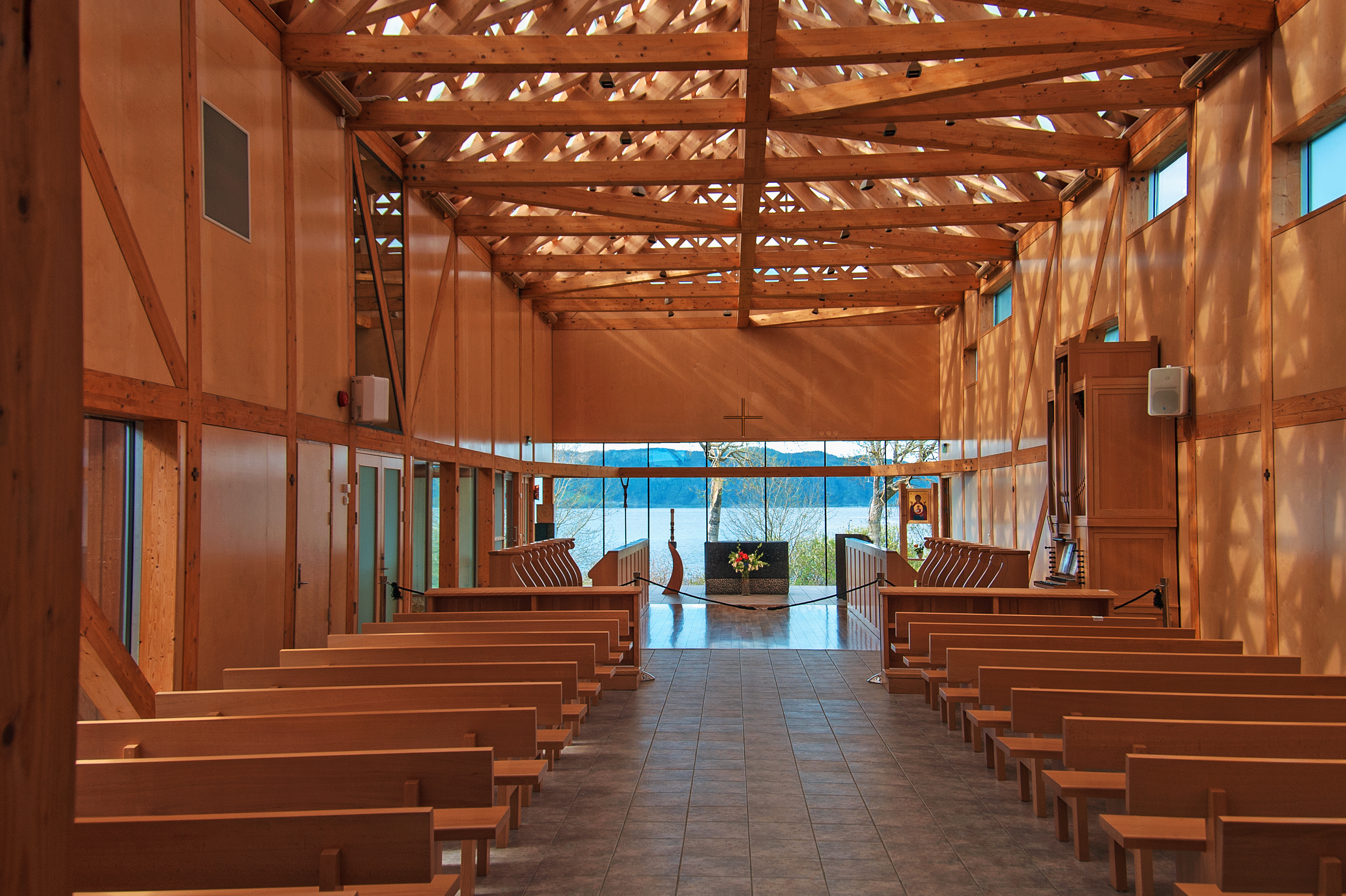 The Tautra Maria Monastary. Chapel interior.